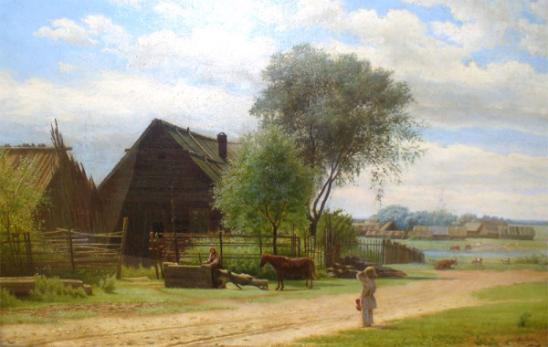 Клодт Михаил Константинович. Русская деревня. 1867. Холст, масло, 38х60. Сочинский художественный музей. Инв. Ж-131. Справа внизу подпись коричневым: «МКлодтъ». Пост. из городской больницы № 2 г. Сочи